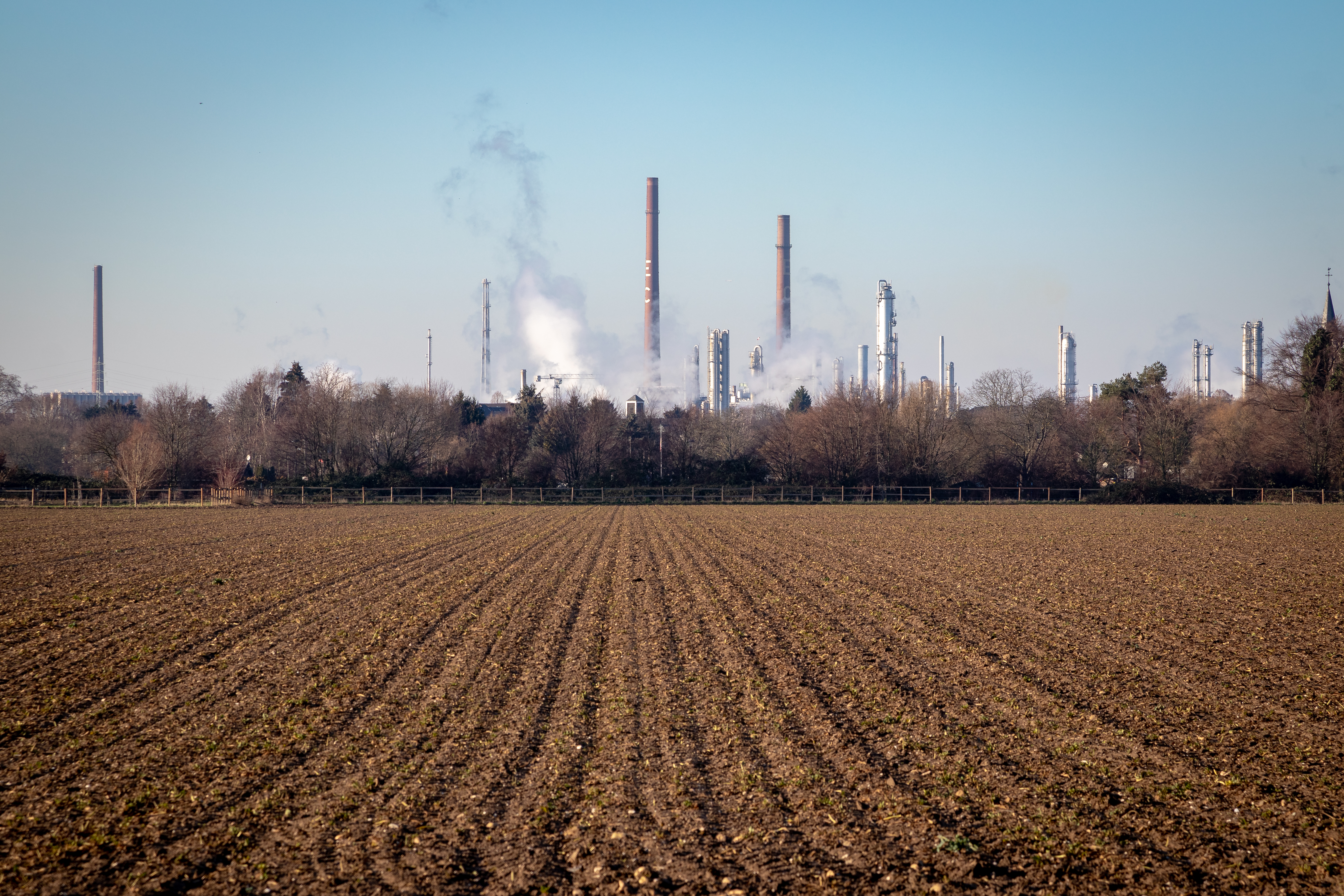 Chemiepark Dormagen, aus dem Kölner Norden betrachtet